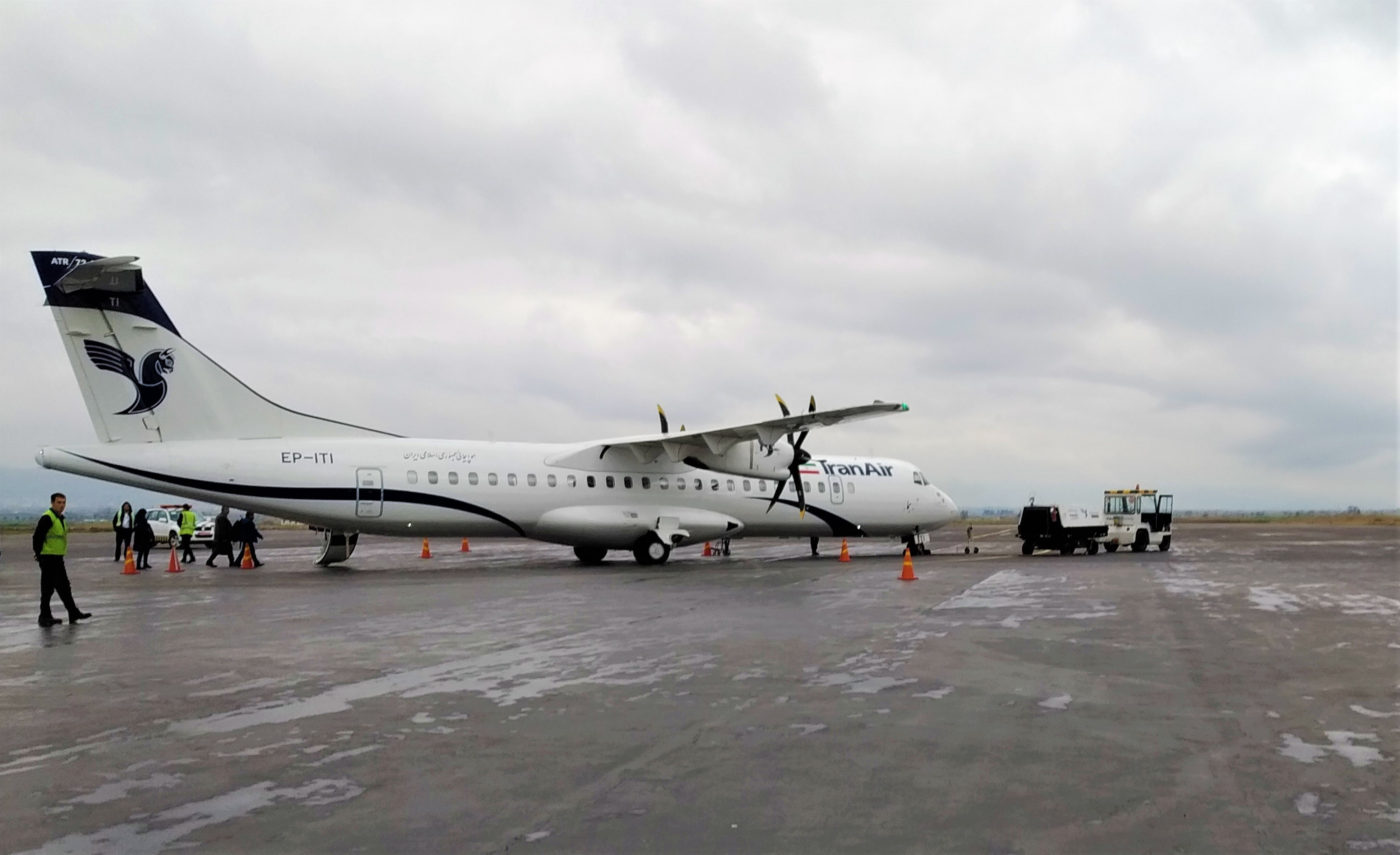 ای تی آر 72 در فرودگاه گرگان